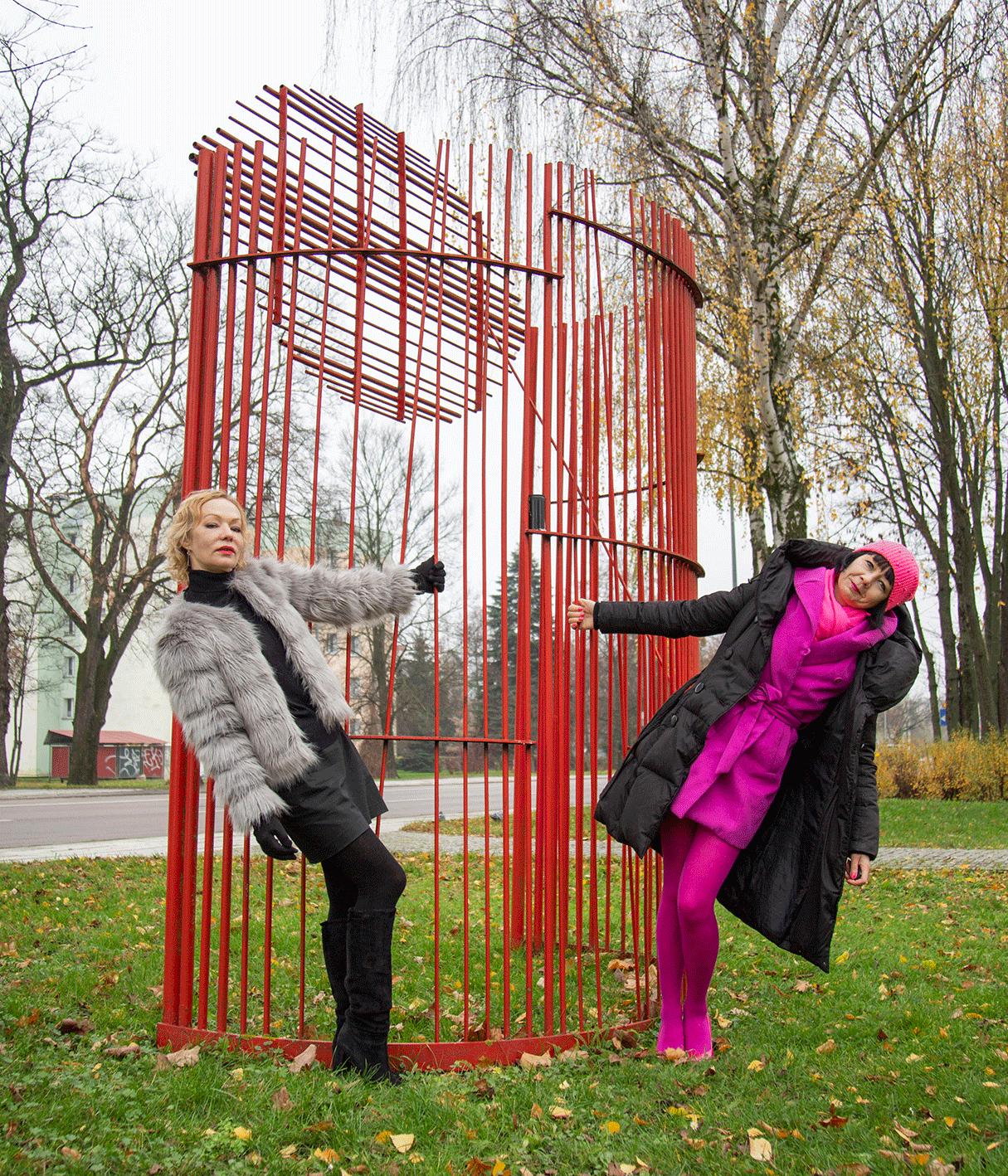 Rzeźba Wandy Gołkowskiej powstała w czasie I Biennale Form Przestrzennych w 1965 r. w Elblągu, wraz z artystkami: Agatą Zbylut i Iwoną Demko, które w ten przewrotny sposób oddają hołd rzeźbiarce w ramach projektu Marzycielki, realizowanego w Centrum Sztuki Galeria EL. Weblinks [1]